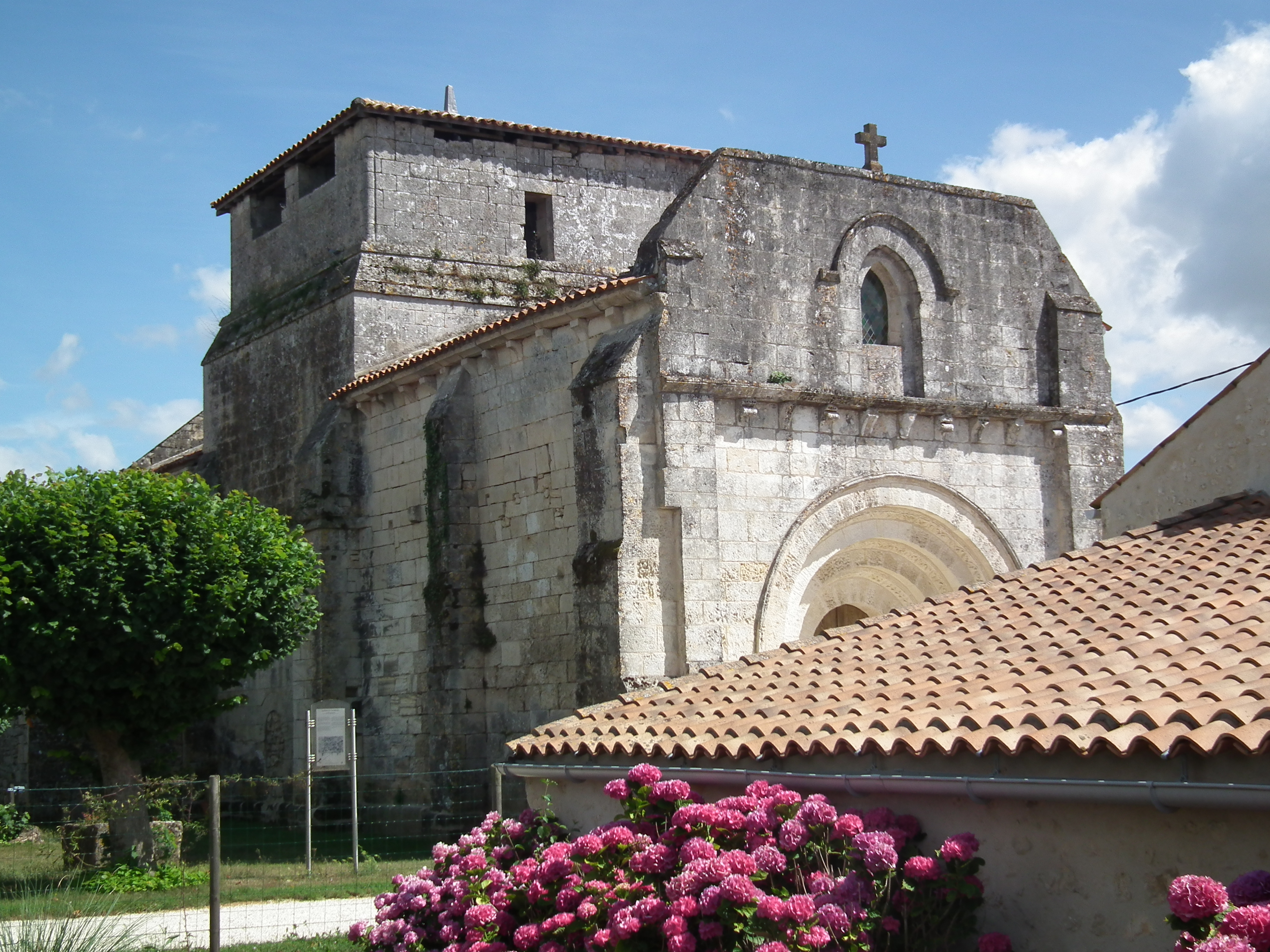 Eglise Saint-Pierre de Machennes, commune de Mazerolles